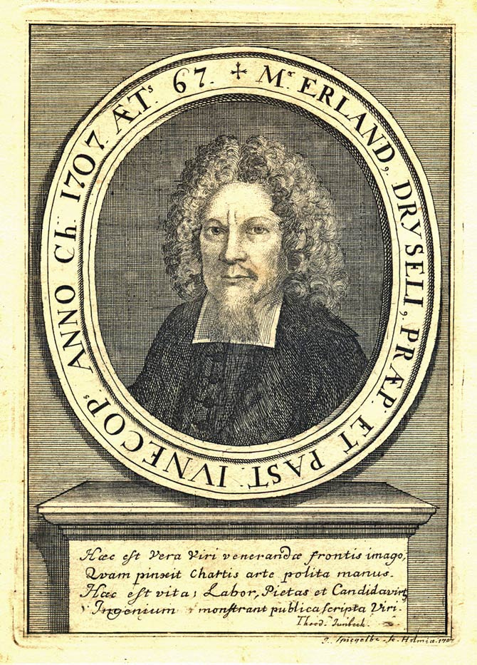 1 grafiskt blad, kopparstick Kopparstick föreställande Erland Benedikt Dryselius (1641-1708), lärd, teolog och hovpredikant. Konstnär: Johan Spiegelberg